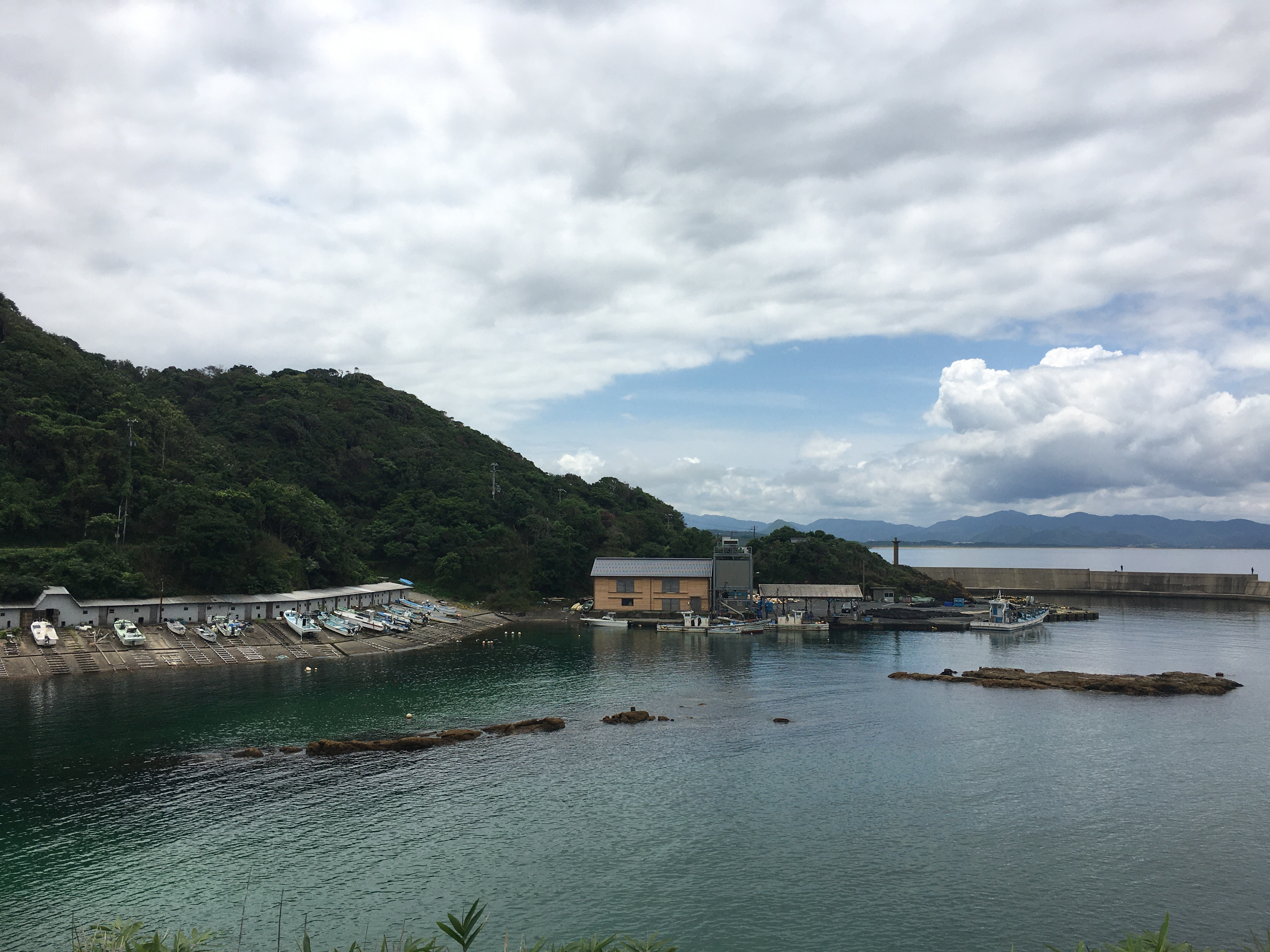 京都府京丹後市網野町の浜詰漁港